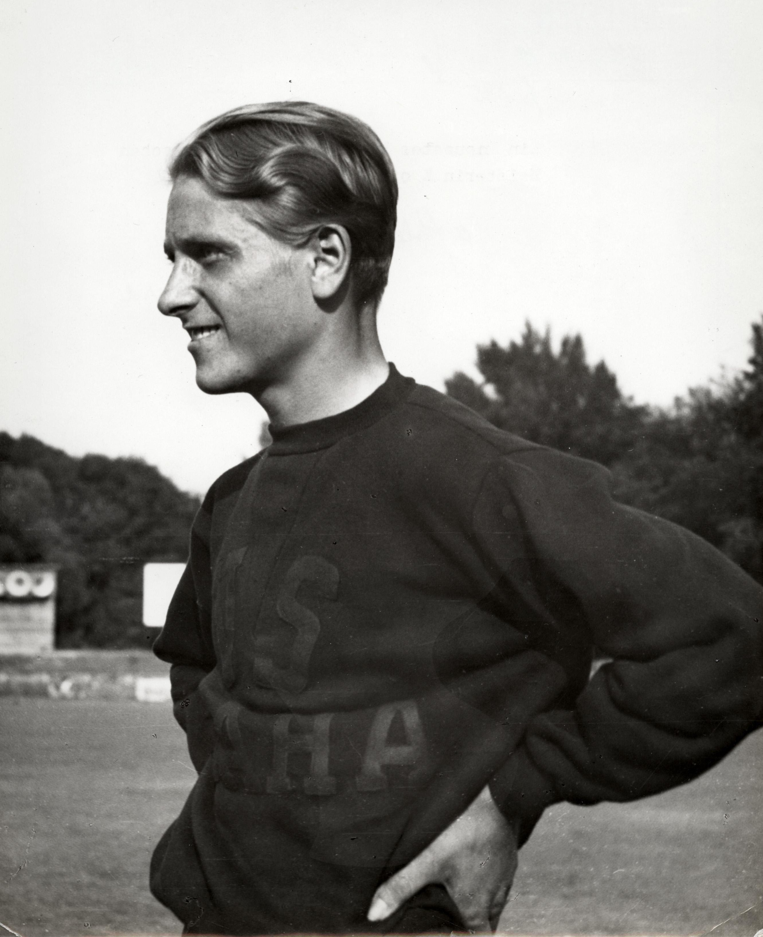 Transsexualiteit. De Tsjechische atlete Zdenka Koubkova, die twee wereldrecords op haar naam heeft staan, heeft kort geleden verklaard, dat zij voortaan als man wenst te worden beschouwd en heeft de naam Benek Kubek aangenomen. Foto: Portret van Zdenka Koubkova.